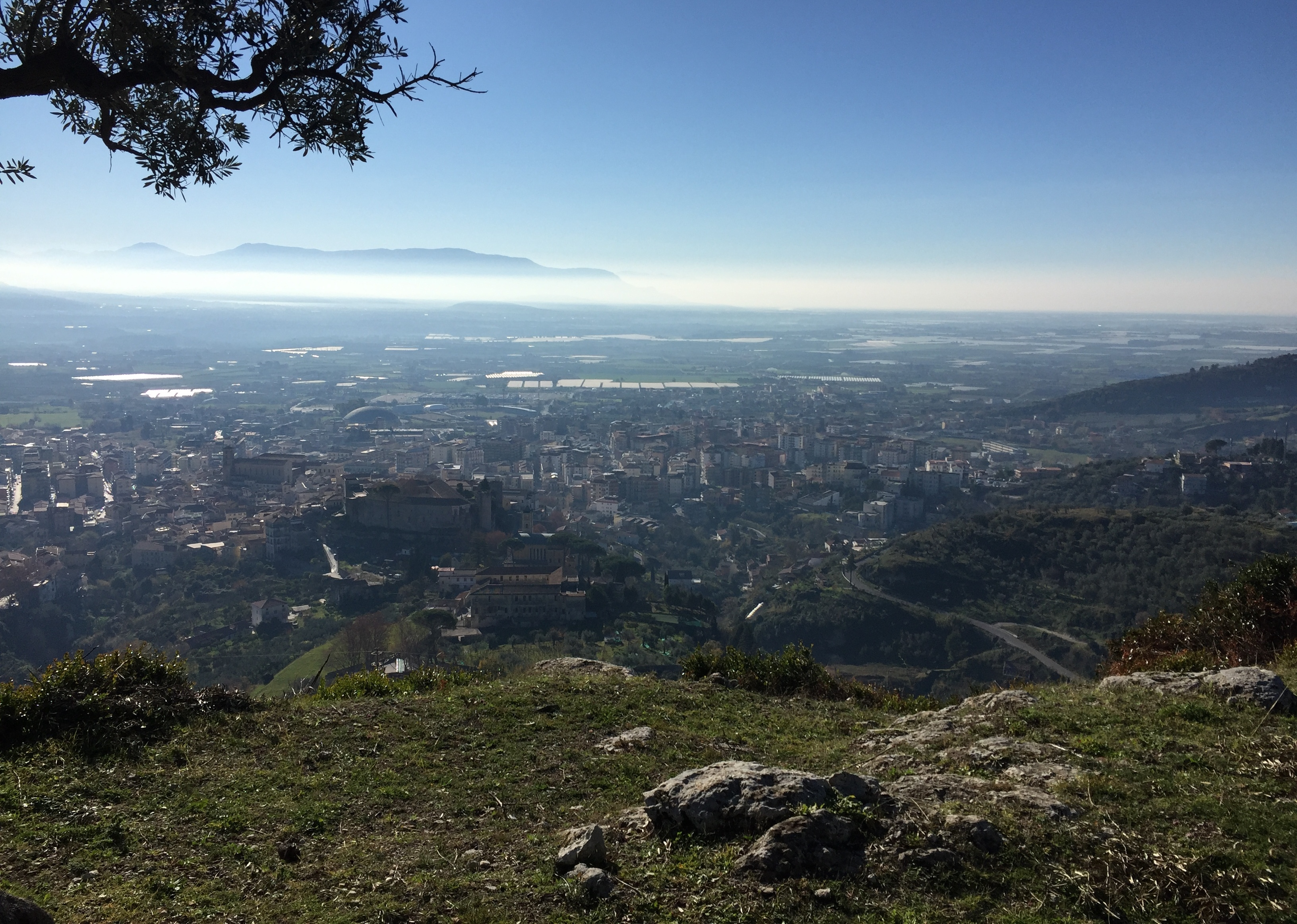 Panorama della Città di Eboli